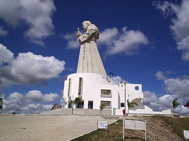 Vista Lateral do Memorial Frei Damião em Guarabira, PB - Brazil.